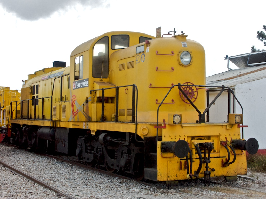 Local: Estação do Poceirão [Linha do Alentejo, PK 30] Data e hora: 31 de Agosto de 2008 [11h14] Material: Locomotiva 1512 [Alco] N.º UIC: 90 94 200 0017-8 P (Ferrovias MVLM 08)